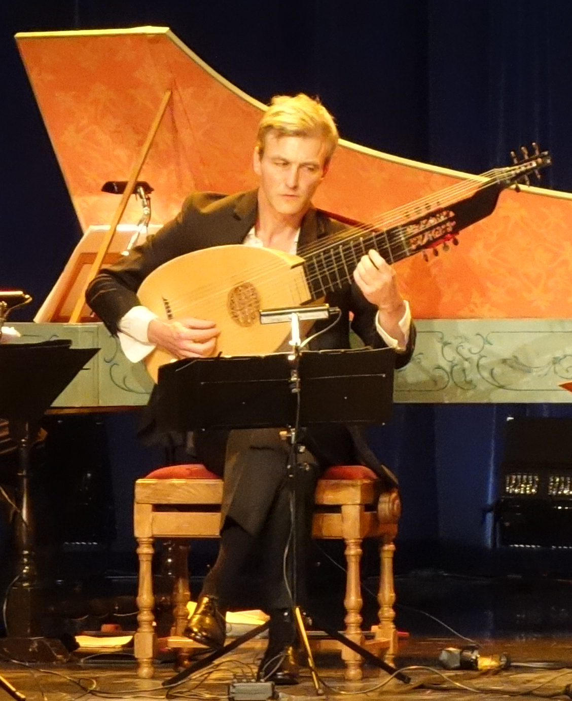 L'ensemble de musiciens « Le Poème harmonique » et son directeur artistique Vincent Dumestre (au centre) jouant une représentation de « La mécanique de la générale » dans le cadre du Festival de musique du Haut Jura au Théâtre de Lons-le-Saunier